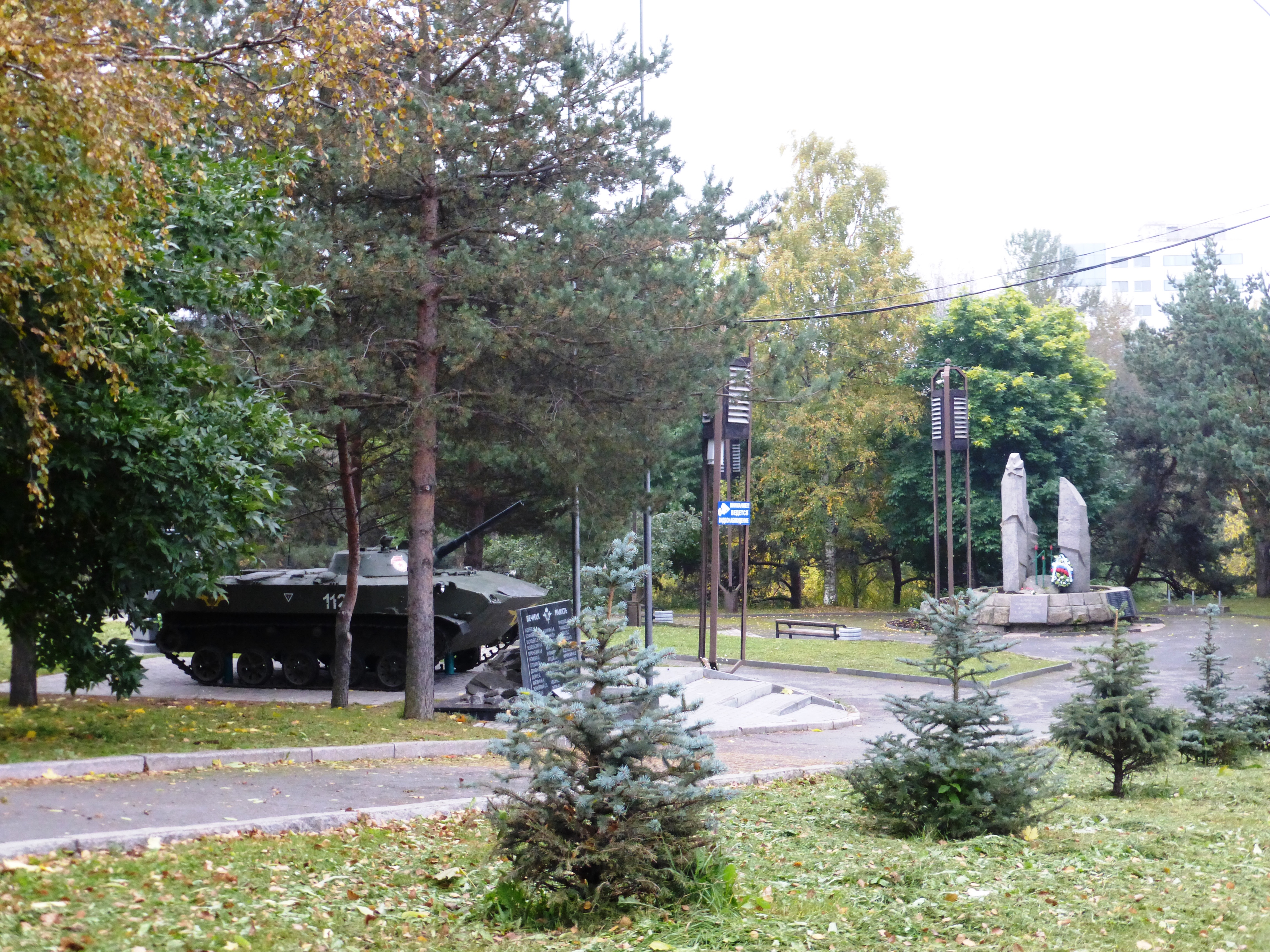 Мемориал воинам-интернационалистам «Черный тюльпан» в Петрозаводске в сквере на ул. Антикайнена.